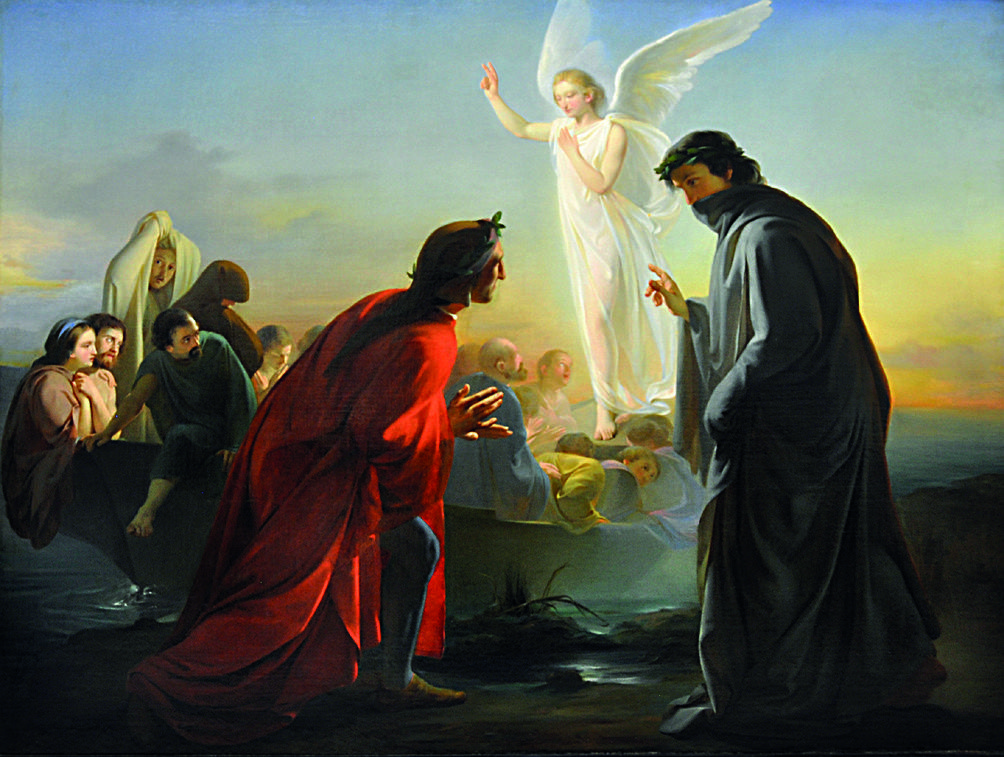 Domenico Morelli, Dante e Virgilio nel Purgatorio.